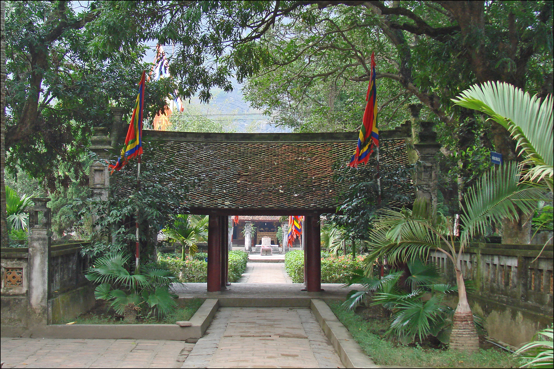 Après l’assasinat du roi Dinh Tien Hoang et de ses fils en 979, le pouvoir passa aux mains du général Le Hoan, puis à ses fils qui régnèrent à Hoa Lu jusqu’en 1010 sous le nom des Le antérieurs.